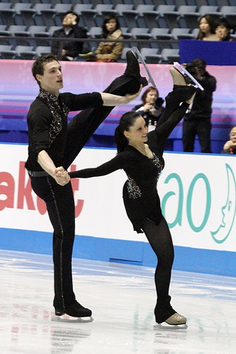 Дарья Попова и Бруно Массо (Франция) на командном чемпионате мира по фигурному катанию 2012